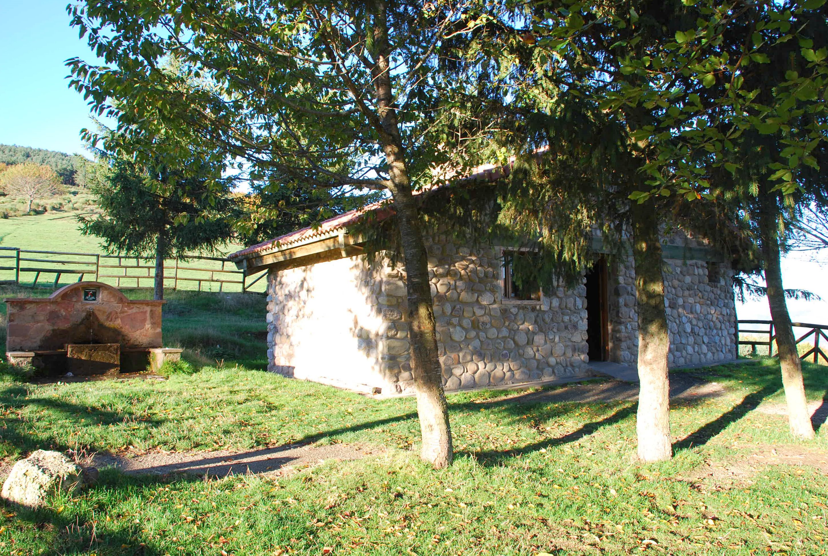 Refugio de Bonicaparra en el término municipal de Ezcaray en La Rioja (España).